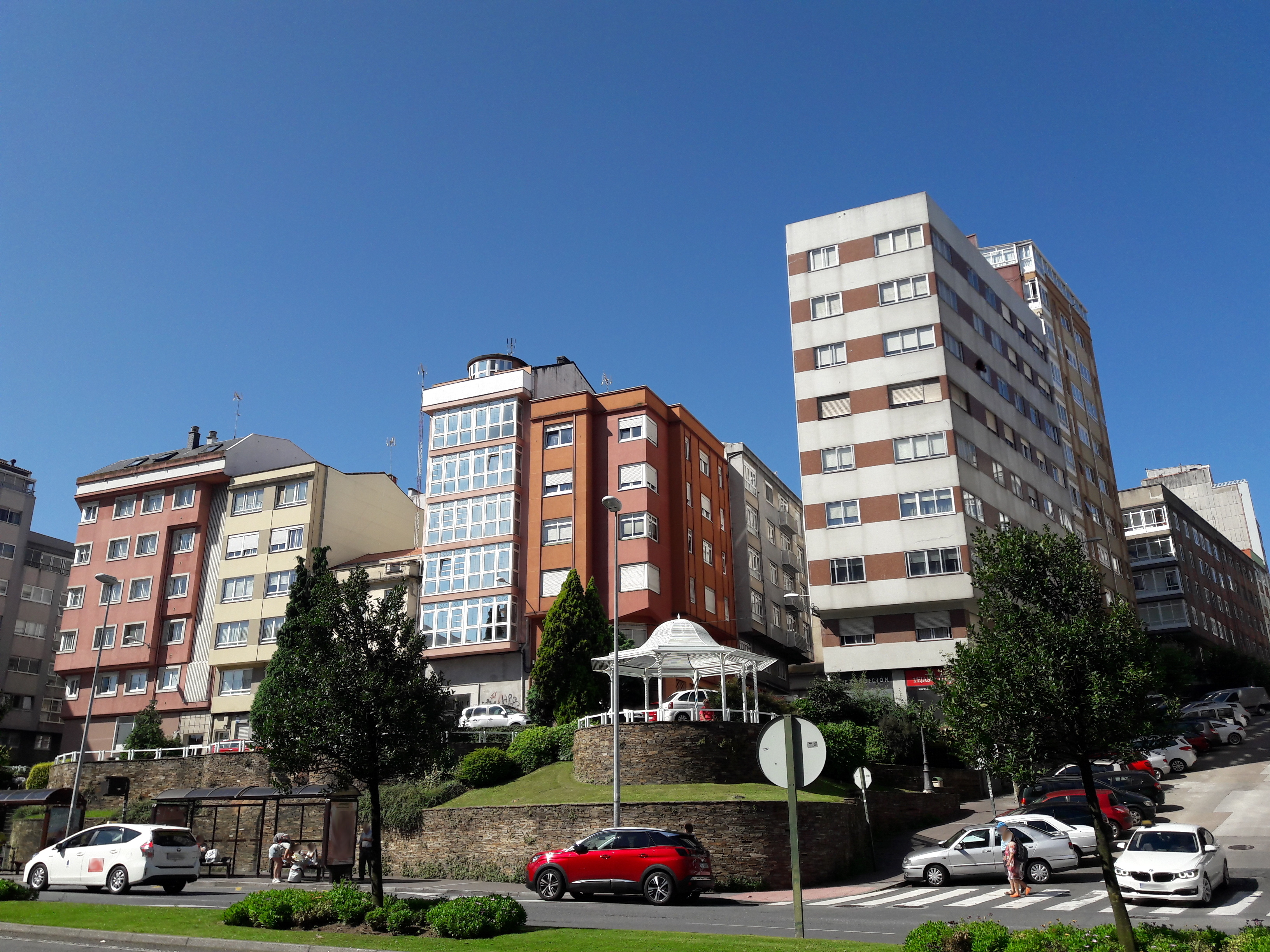 Miradoiro dos Castros